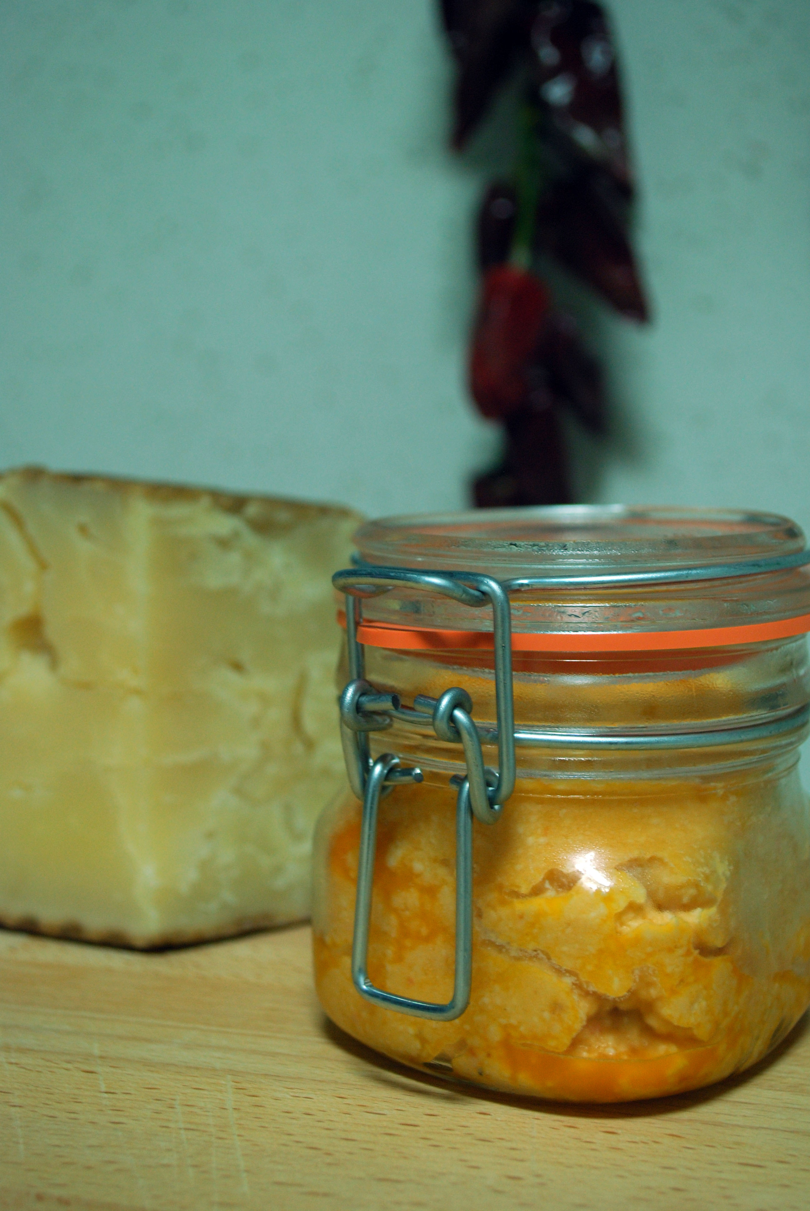 Almogrote, mojo con textura de paté típico de Gomera.